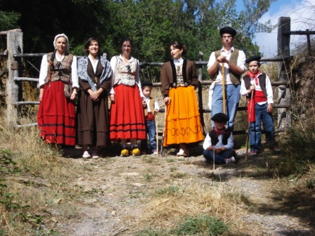 fiesta de los campanos, trajes típicos campurrianos